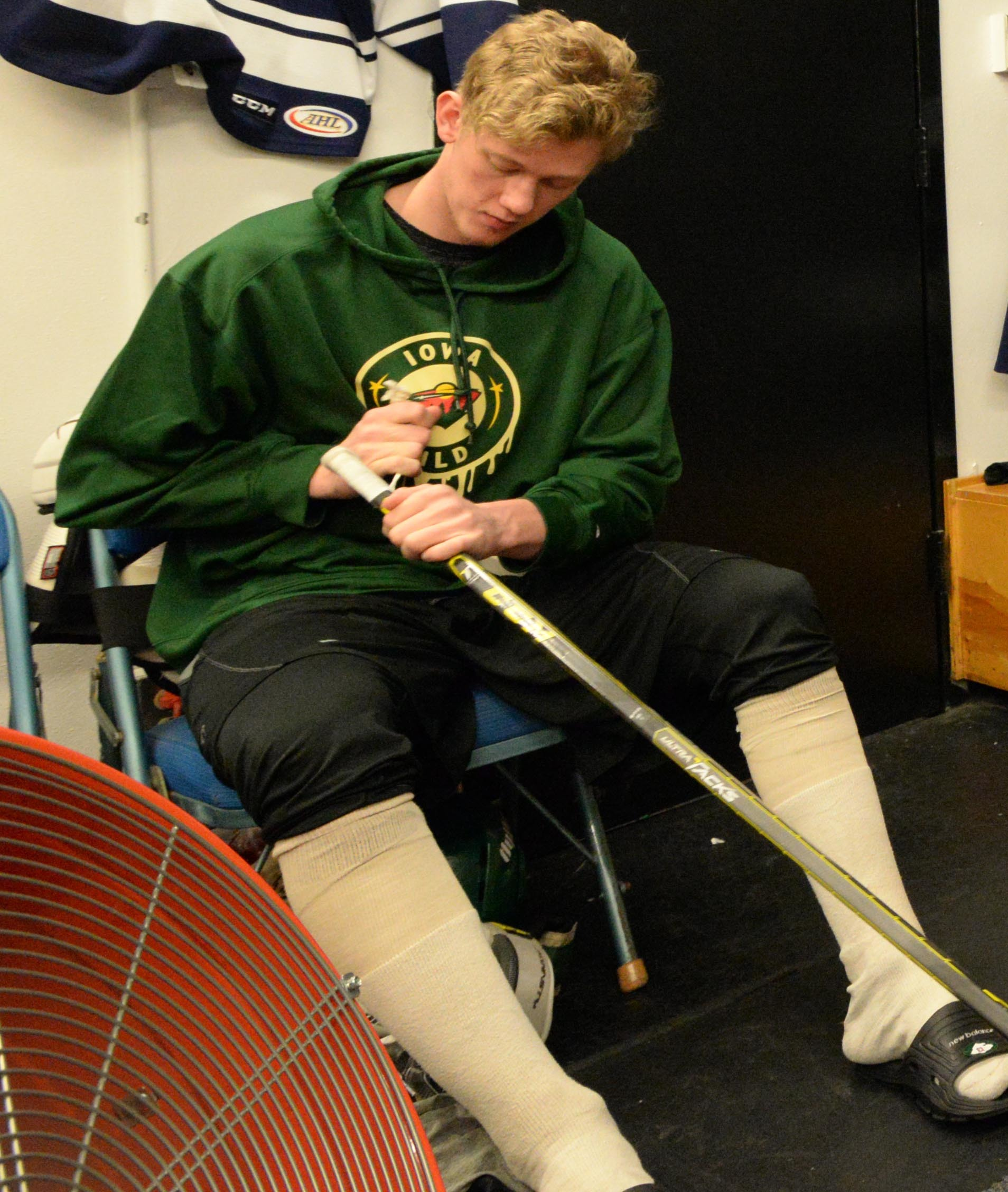 EPP_8598